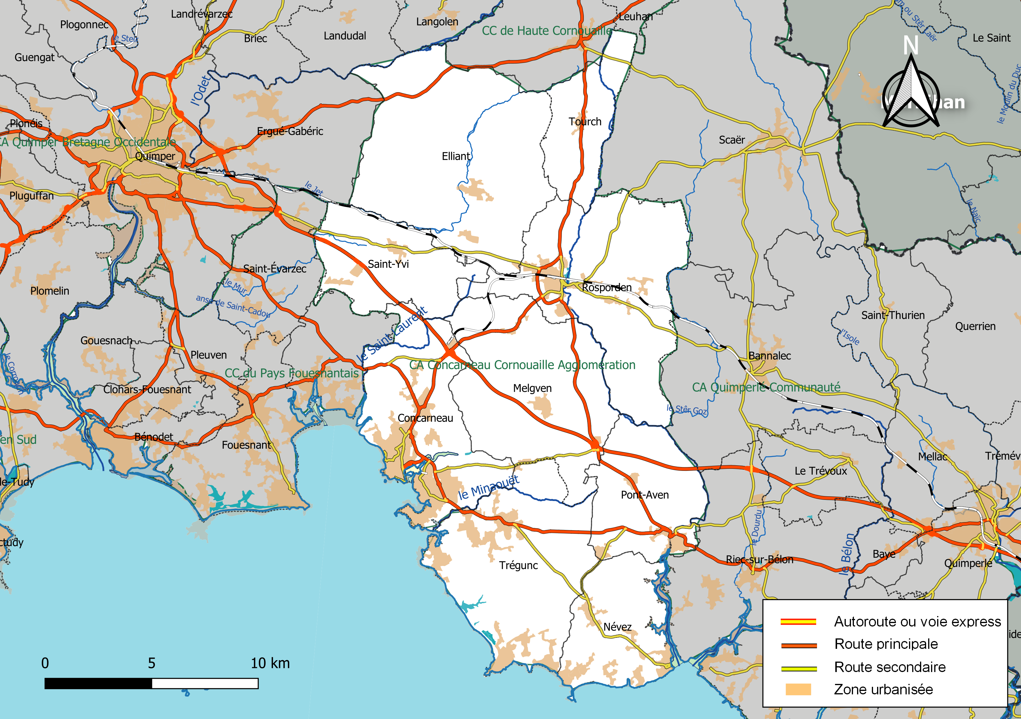 Carte géographique de l'intercommunalité Concarneau Cornouaille Agglomération, département du Finistère, France. Composition au 1er janvier 2019.